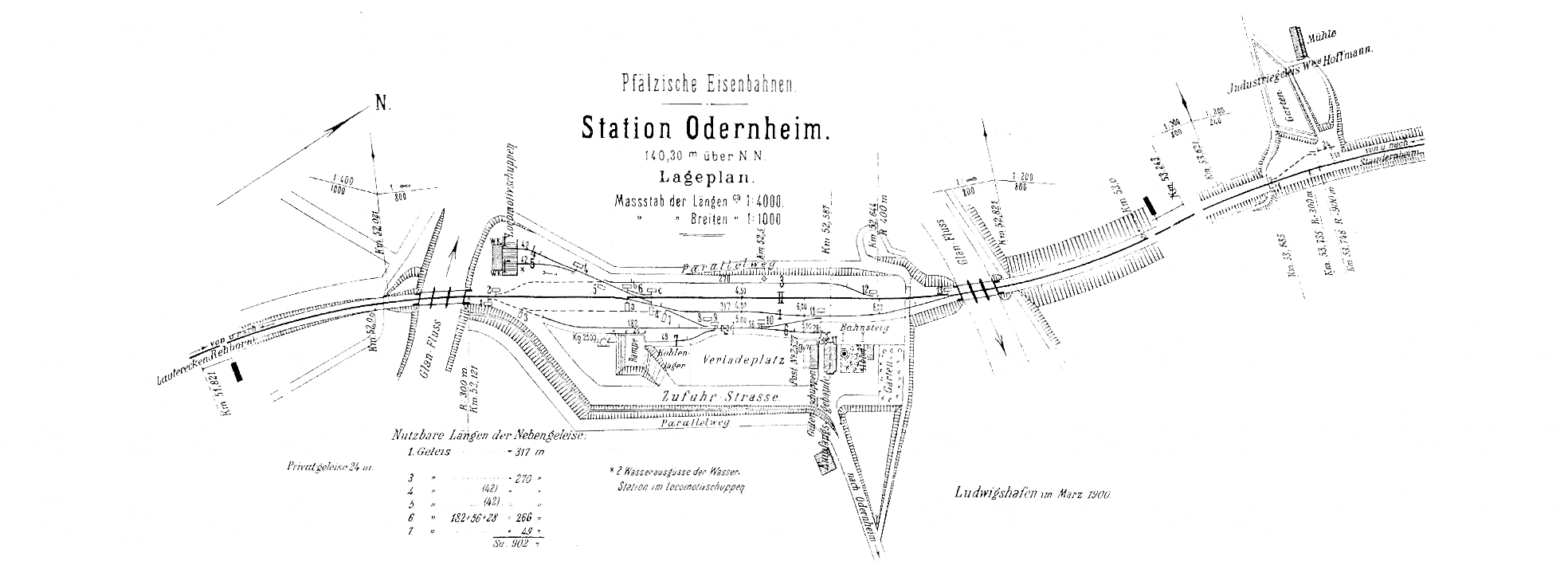 Gleisplan des Bahnhofs Odernhiem im Jahr 1900